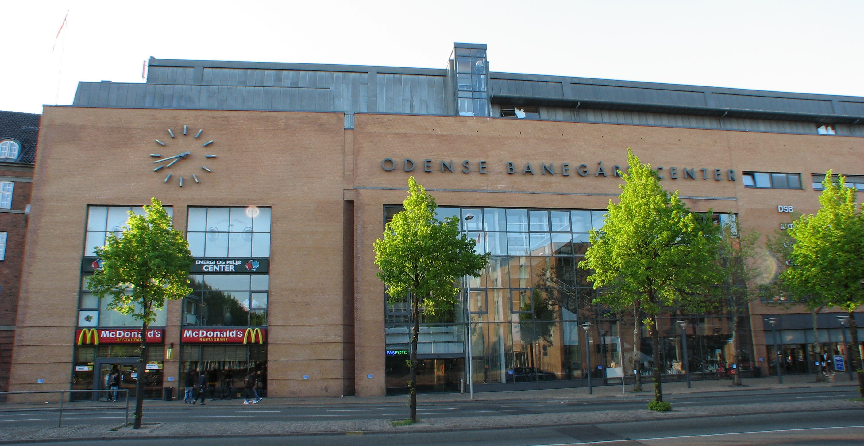 Odense Railroad Centre, Denmark